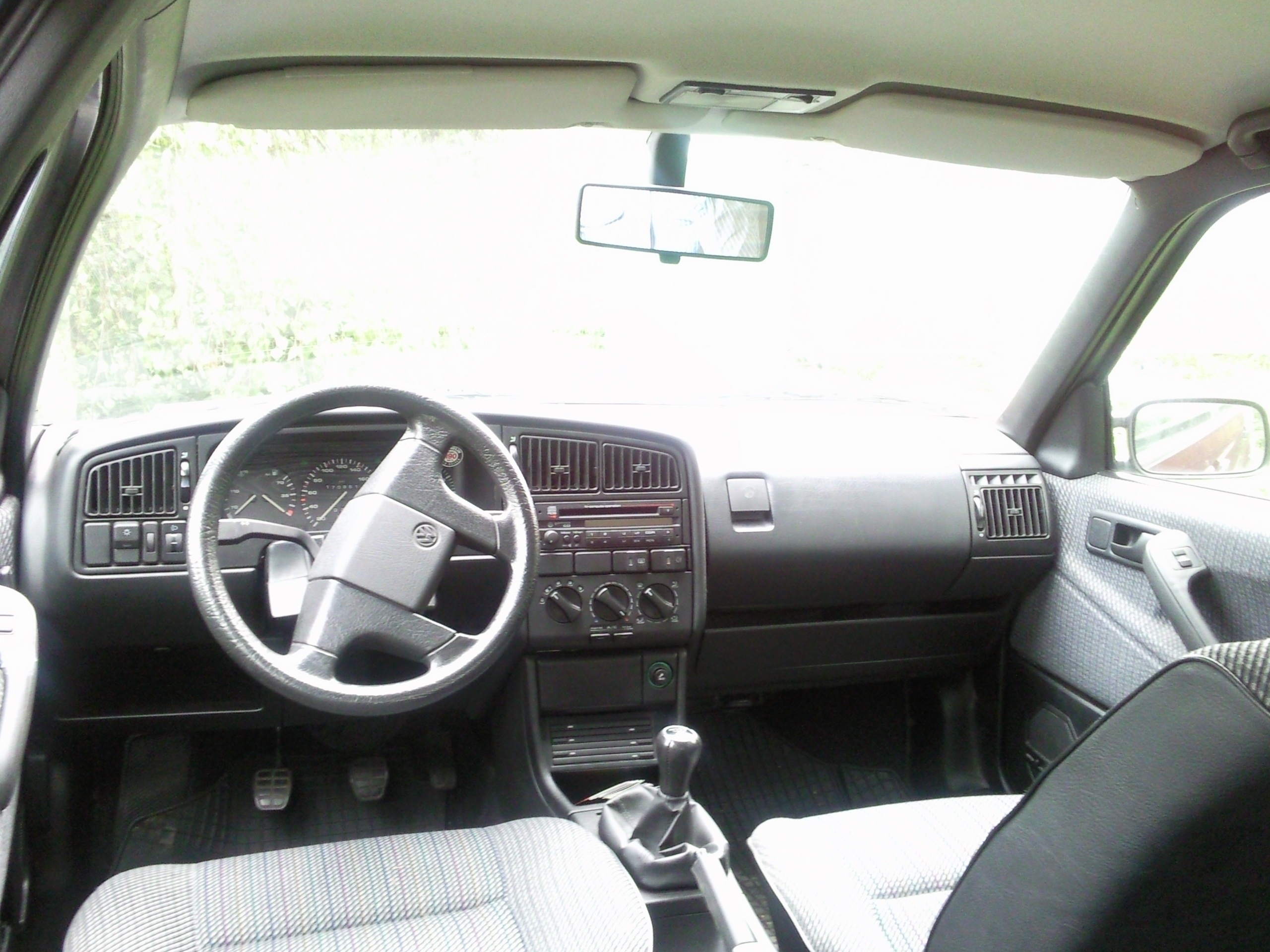 Passat 35i (B3) Variant - Cockpit